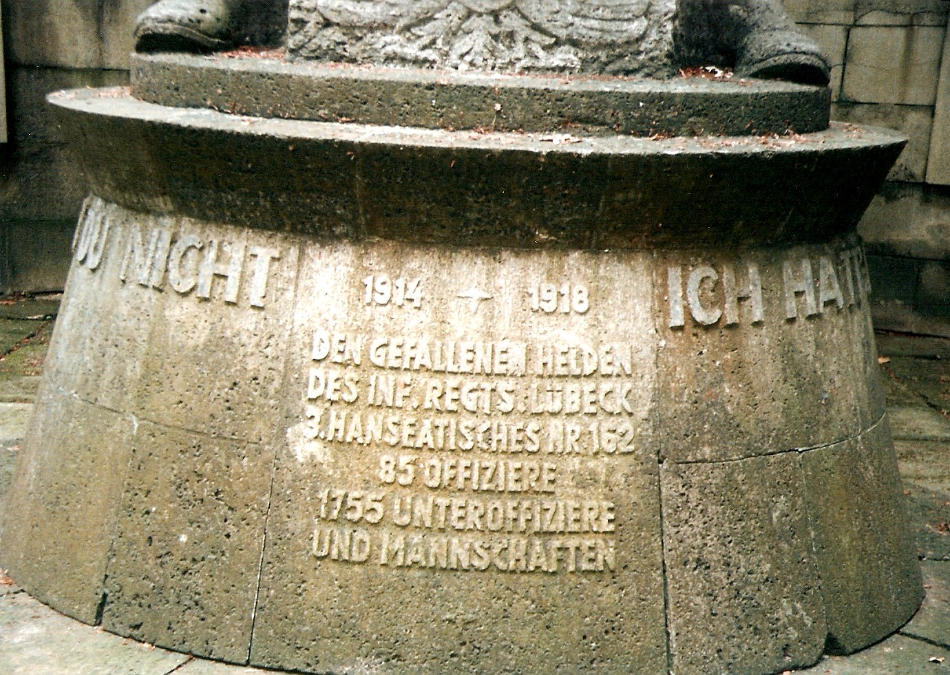 Sockel am Denkmal Helm ab zum Gebet (Lübeck): Tafel eingerahmt im Anfangssatz aus Ludwig Uhlands Der gute Kamerad